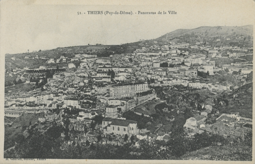 Panorama ancien de la ville de Thiers